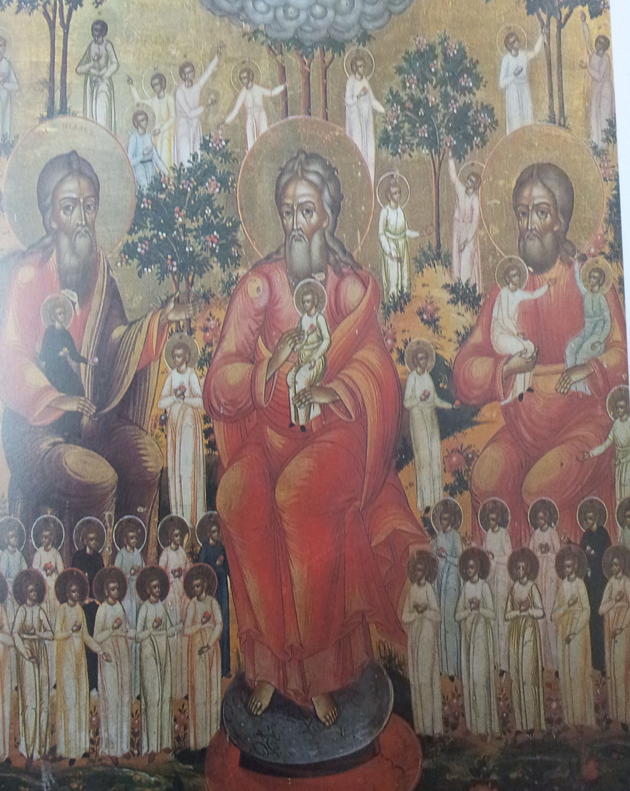 Icoana Sanul lui Avraam